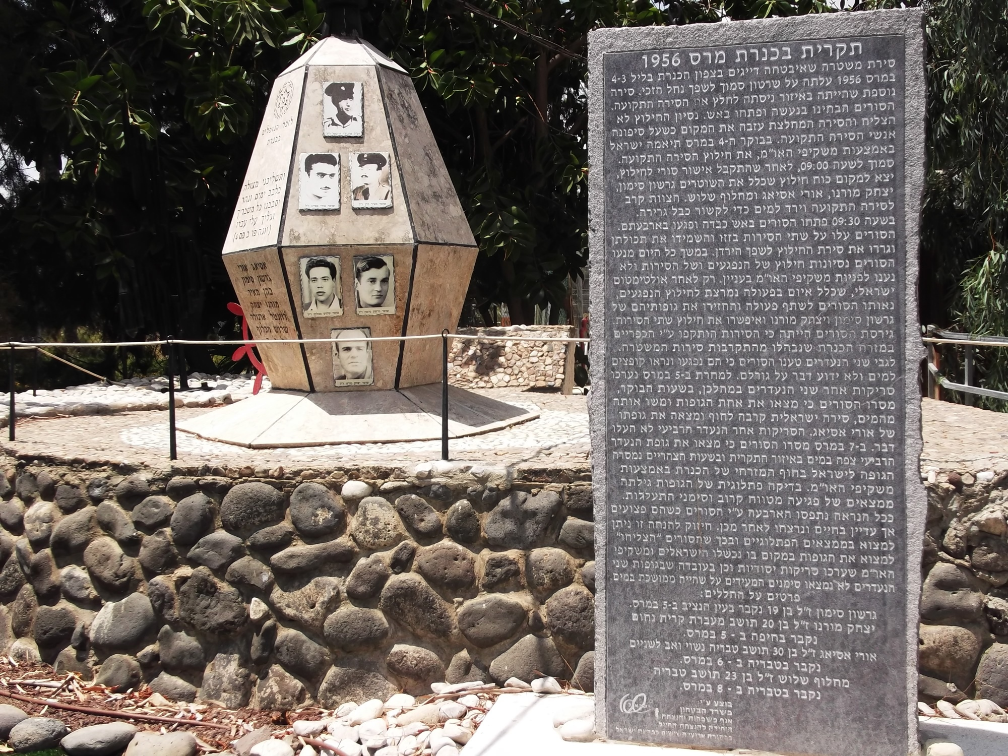 מצבת זכרון לאנשי השיטור הימי שנרצחו ע"י הסורים מרס 1956. בבסיס השיטור הימי מול קיבוץ דגניה